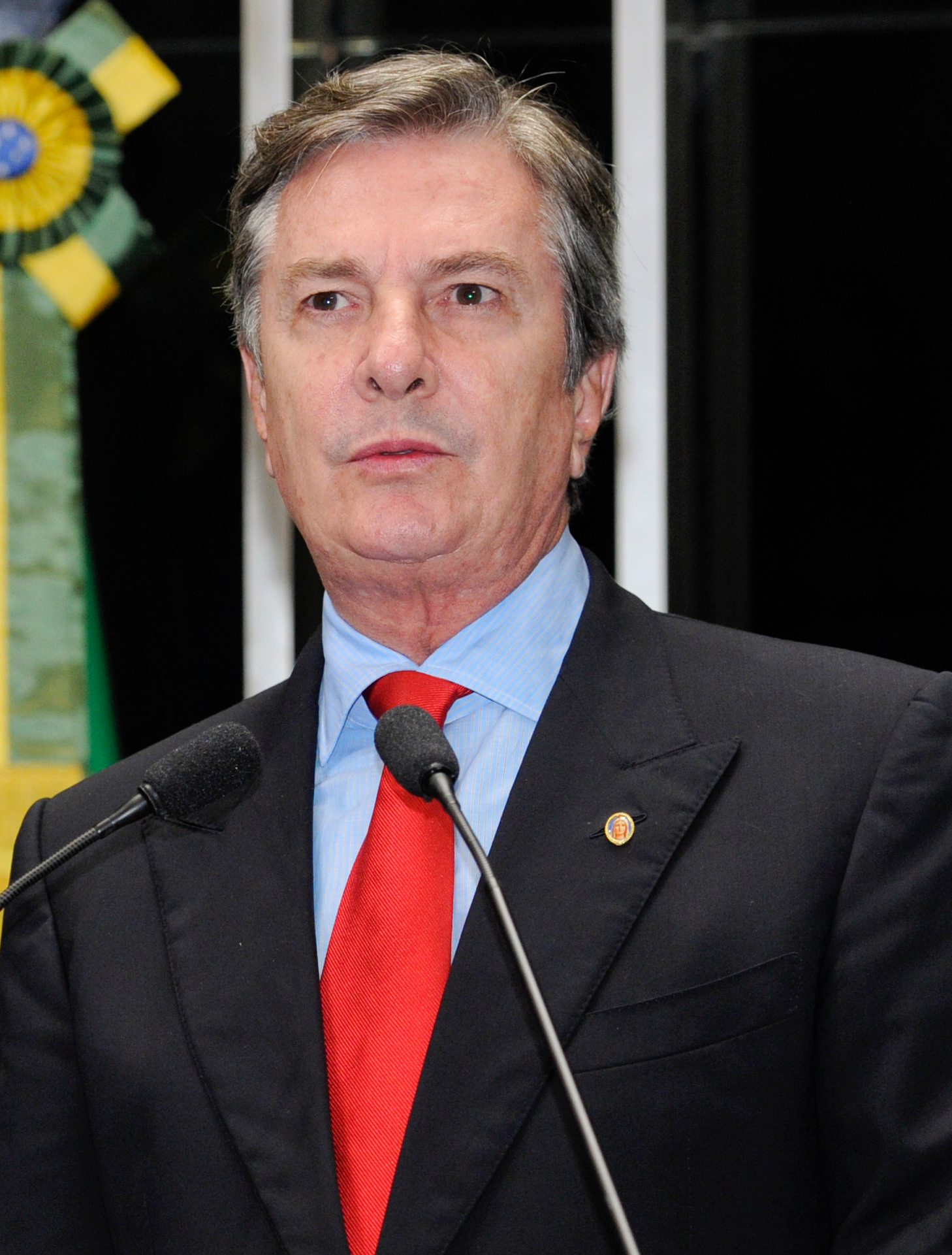 Senador Fernando Collor (PTB-AL) comemora aprovação do projeto que amplia o Supersimples (PLC 60/2014). Em sua opinião, a proposta desburocratiza o sistema tributário, combatendo um"vício institucionalizado em nossa cultura administrativa"